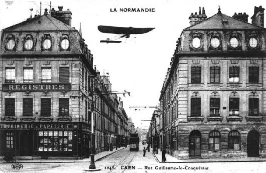 Caen_place_fontette_rue guillaume leconq_deb 20eme